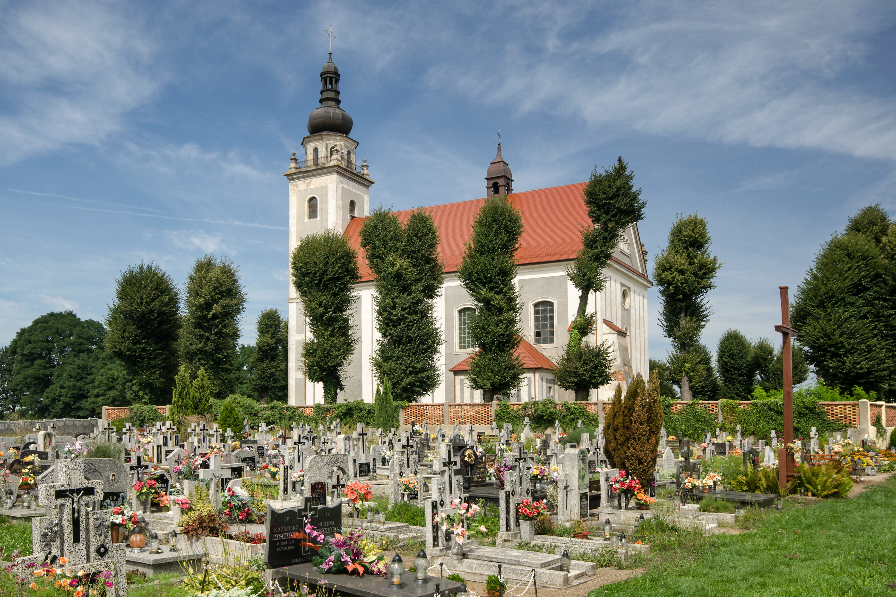 Smogorzów Wielki - rzymskokatolicki kościół parafialny pw. św. Michała Archanioła, 1700-1702, 1957